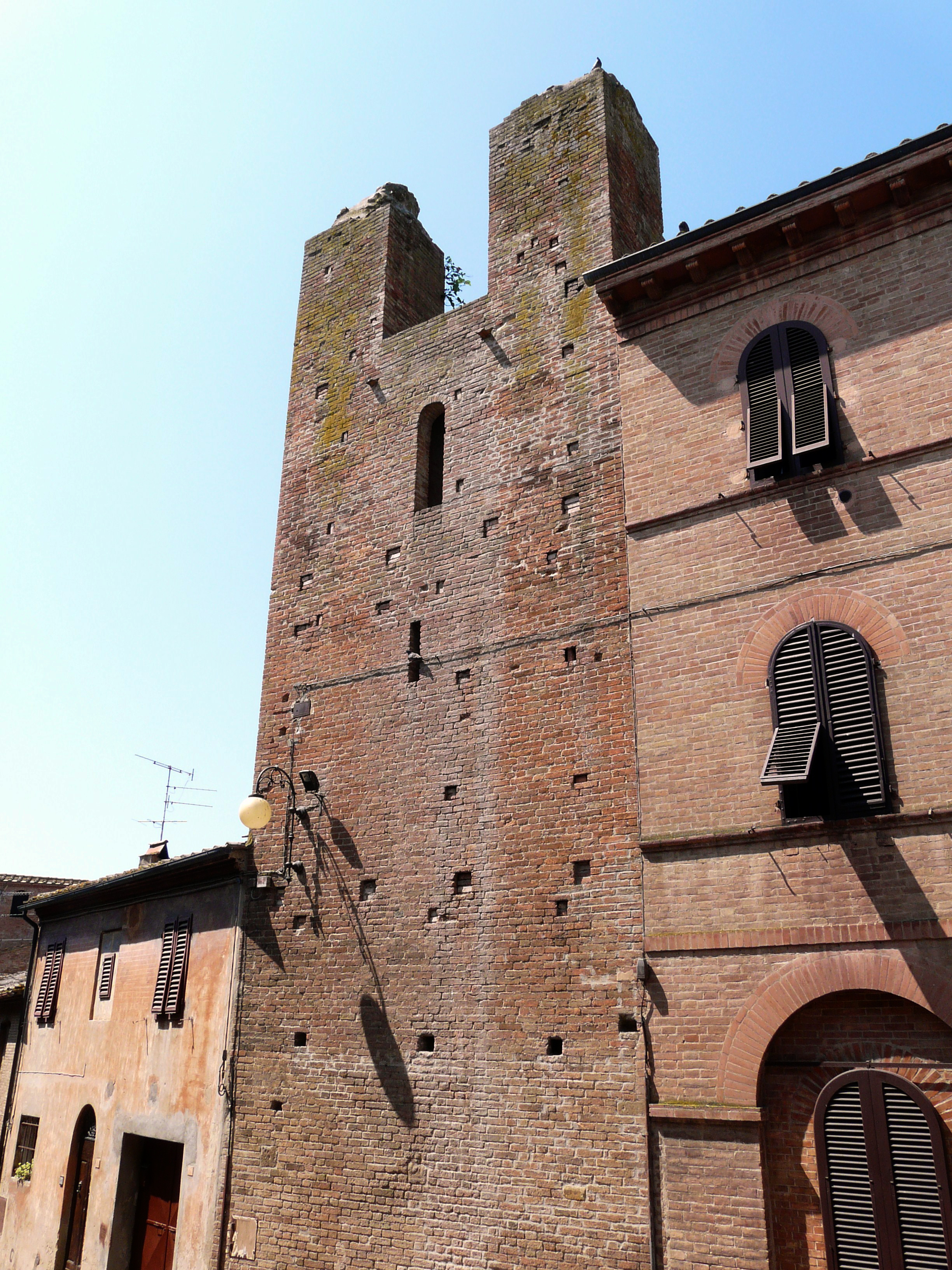 Certaldo Alto, Certaldo, Toscana, Italia